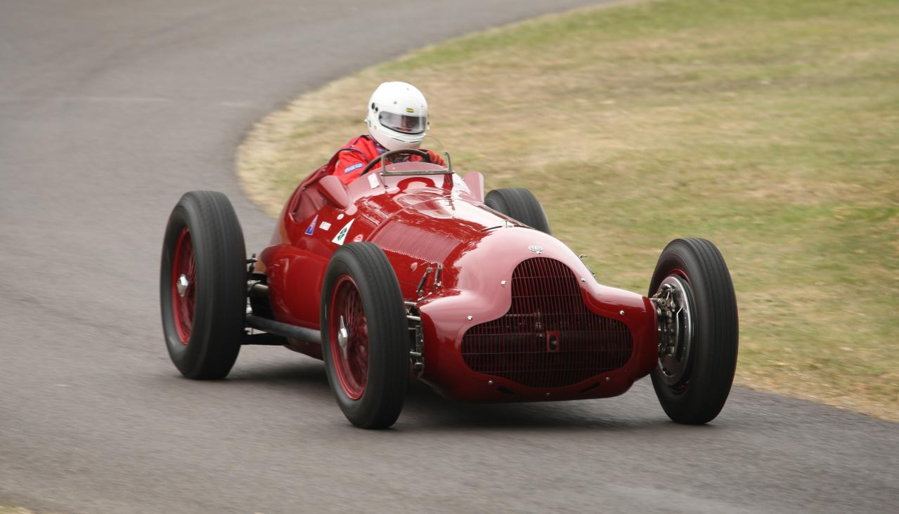 Alfa Romeo 159